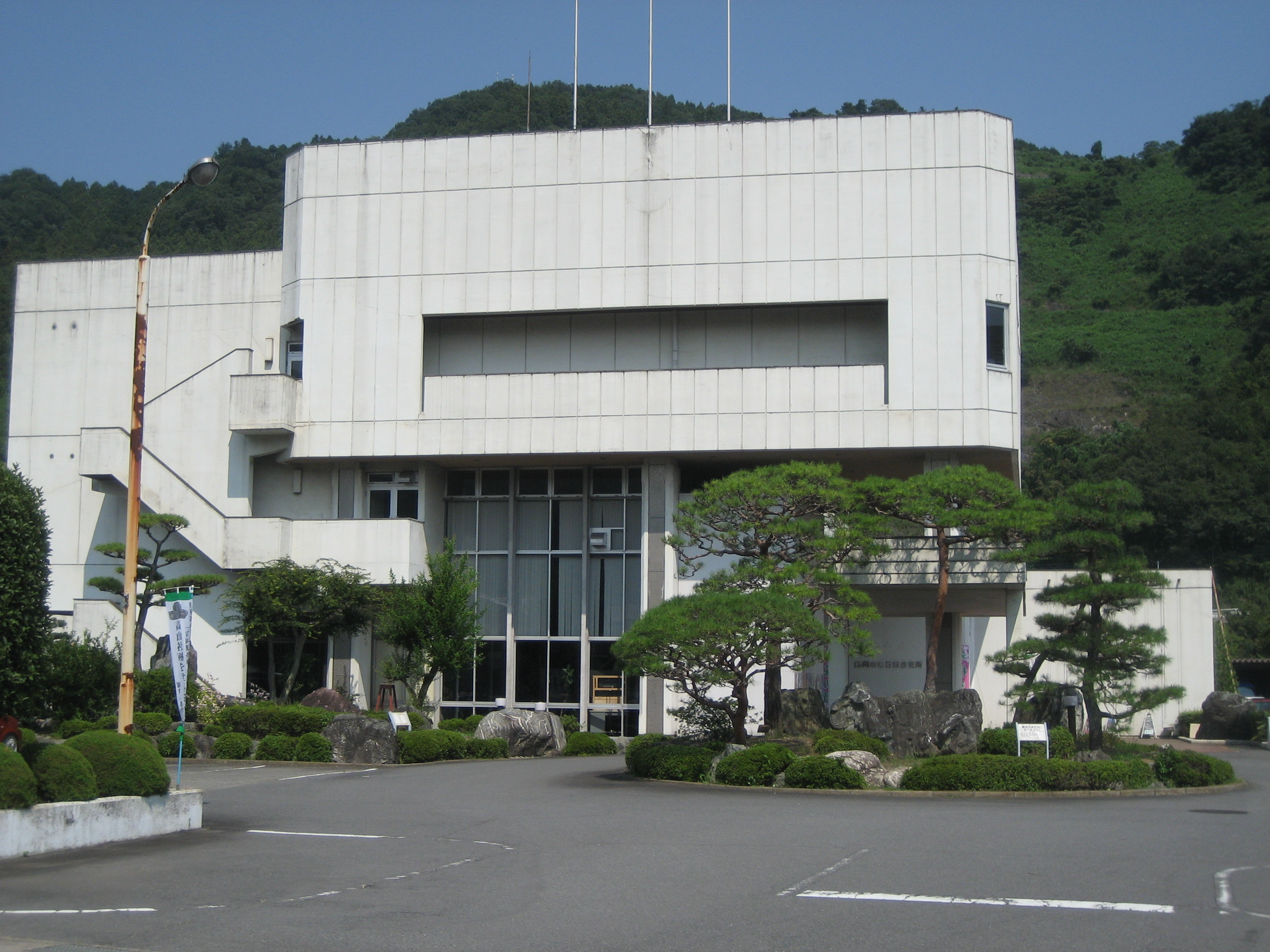 藤岡市役所鬼石総合支所（旧鬼石町役場）庁舎